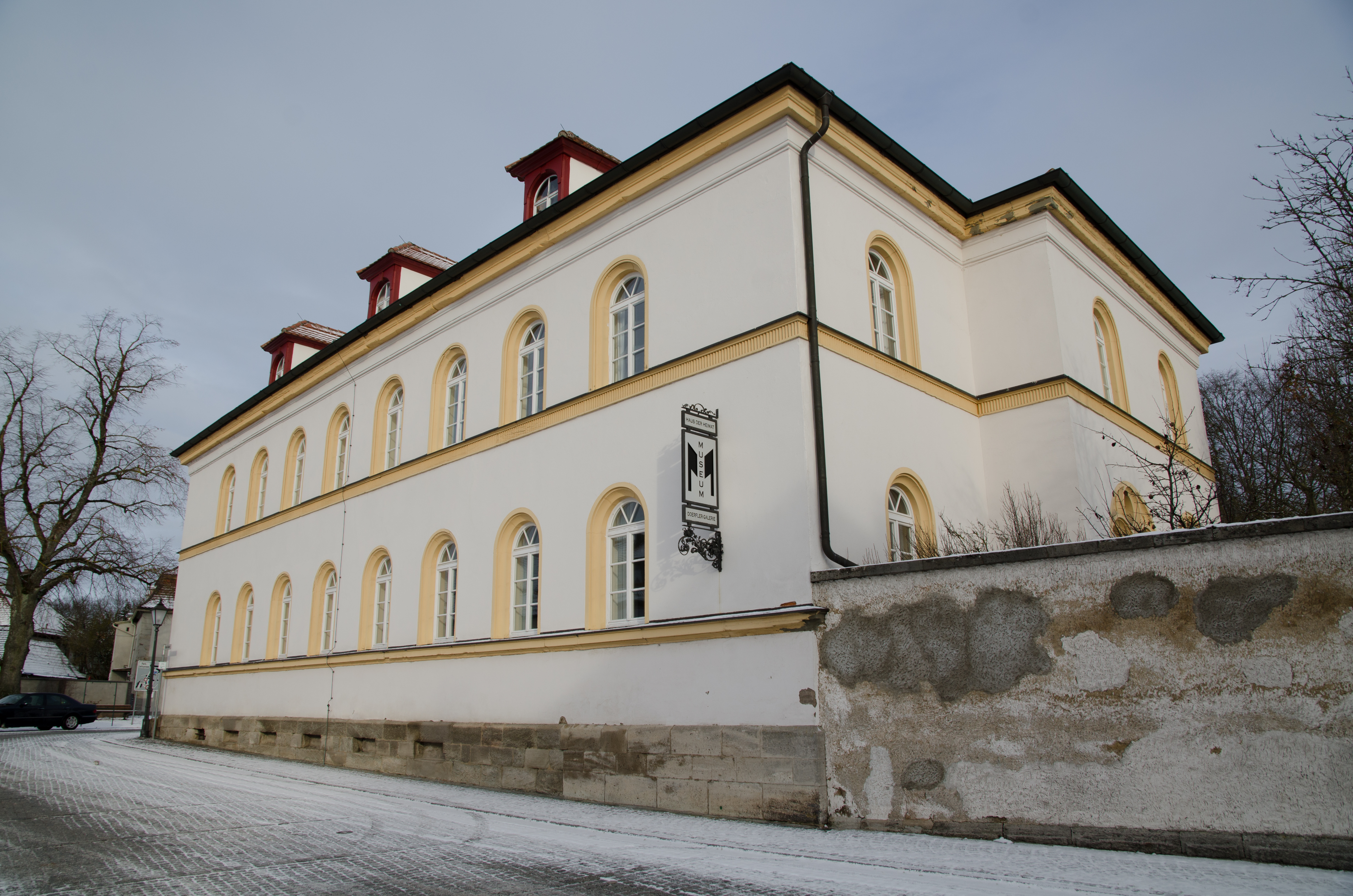 Schillingsfürst, Neue Gasse 1